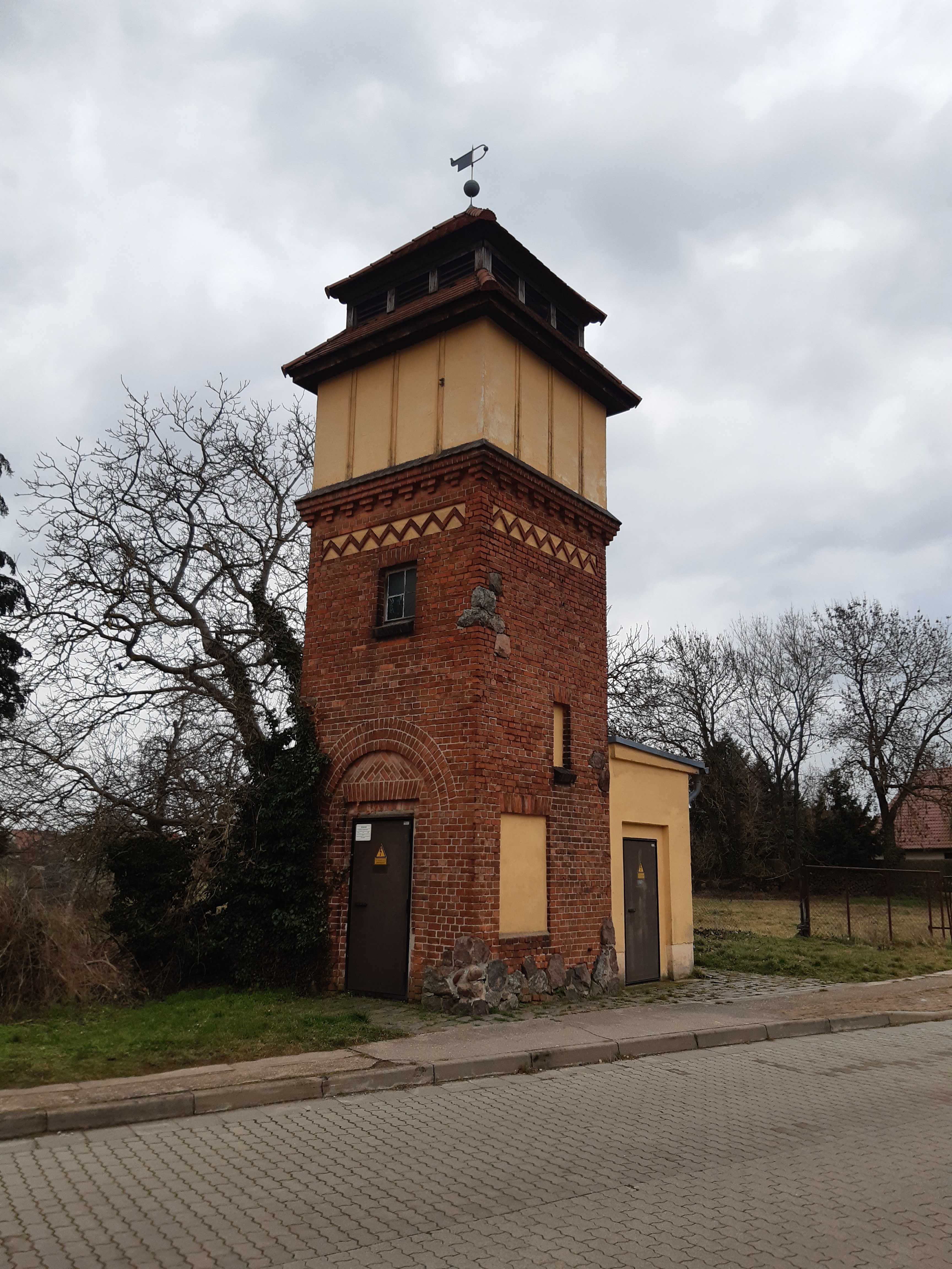 Trafo